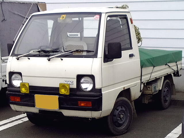 三菱・ミニキャブトラック（4代目：中期型）